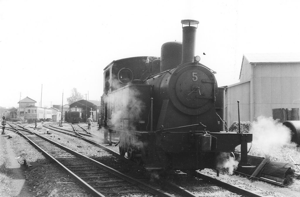 関東鉄道竜ヶ崎線5号蒸気機関車